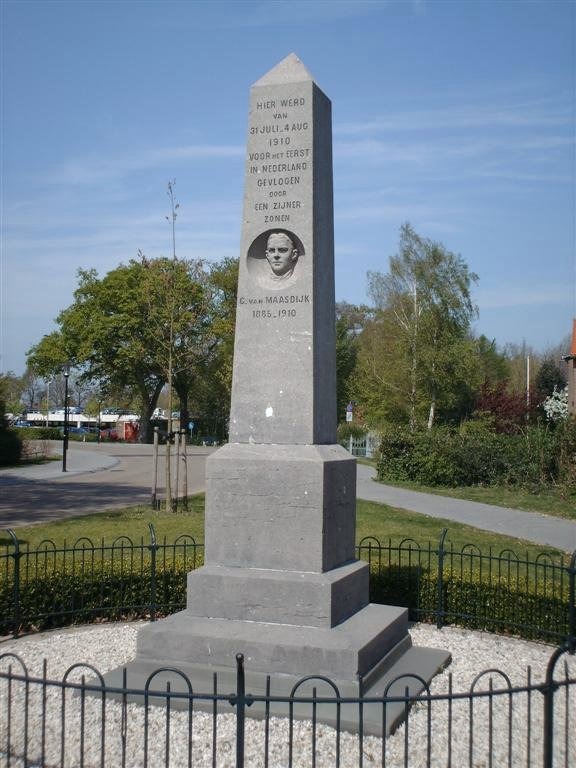 Monument voor Clement van Maasdijk te Heerenveen, gemaakt door Pier Pander